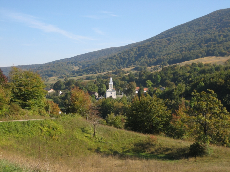 Lipice, crkva Svetog Ivana Krstitelja, Croatia